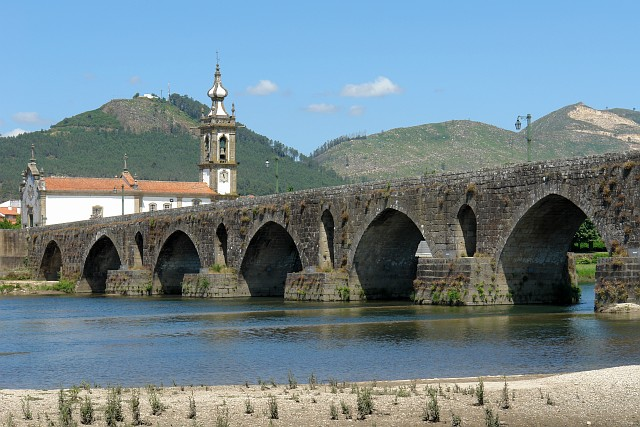 Roman/medieval bridge in Ponte de Lima